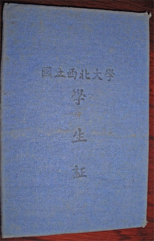 国立西北大学学生证，个人所有。